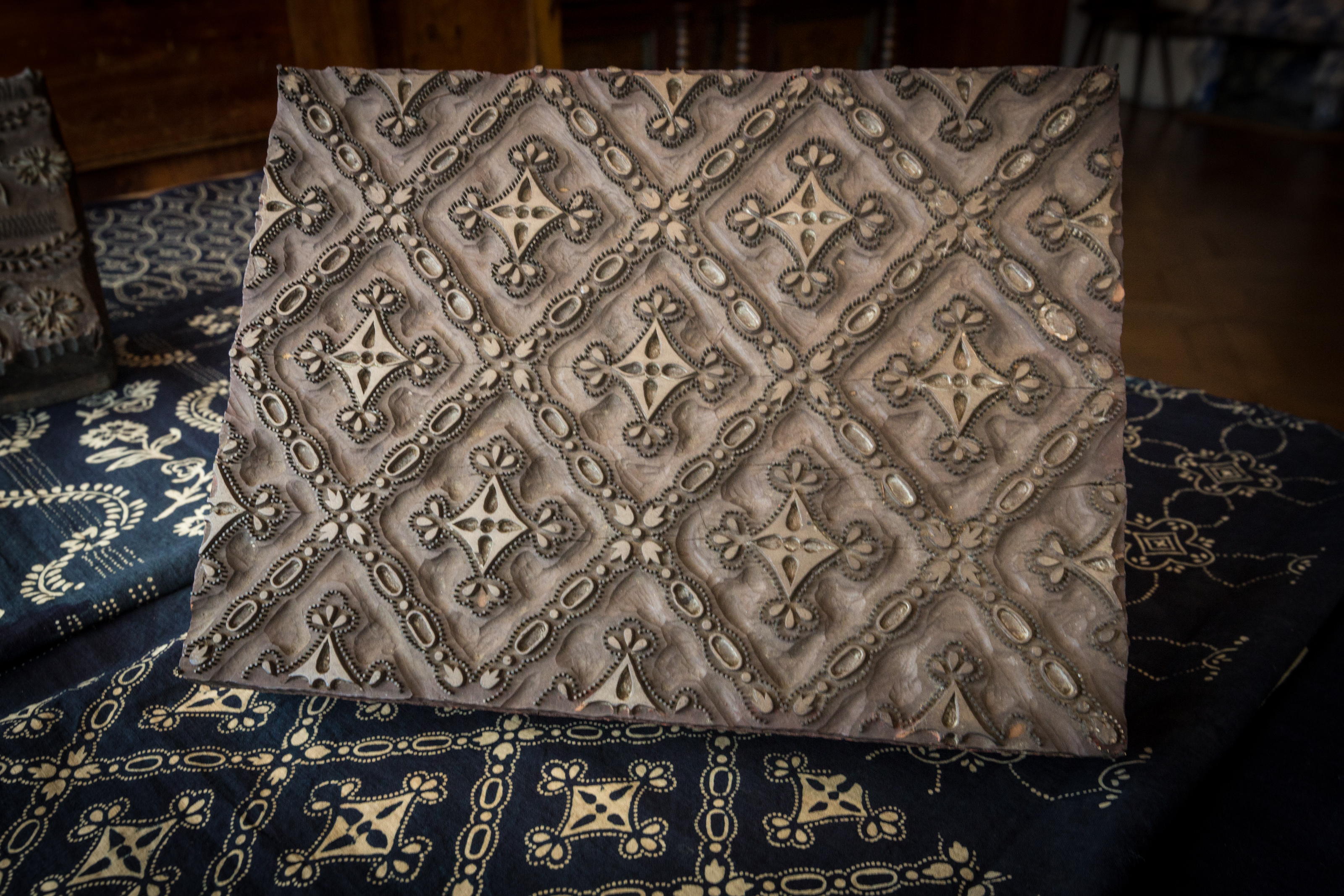 Légende à venir